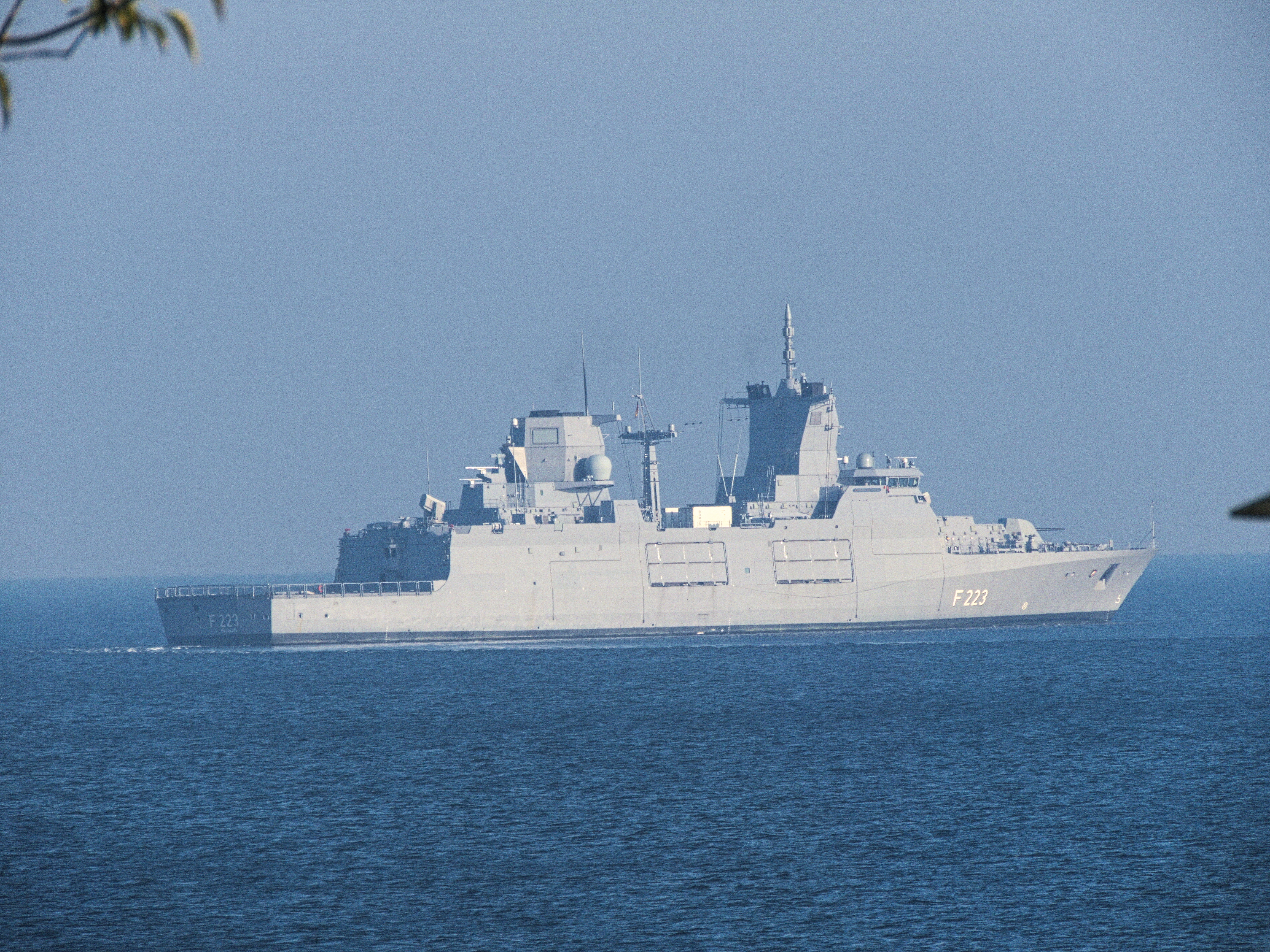 Die Nordrhein-Westfalen (F 223) von Surendorf aus fotografiert bei einem Manöver in der Eckernförder Bucht.